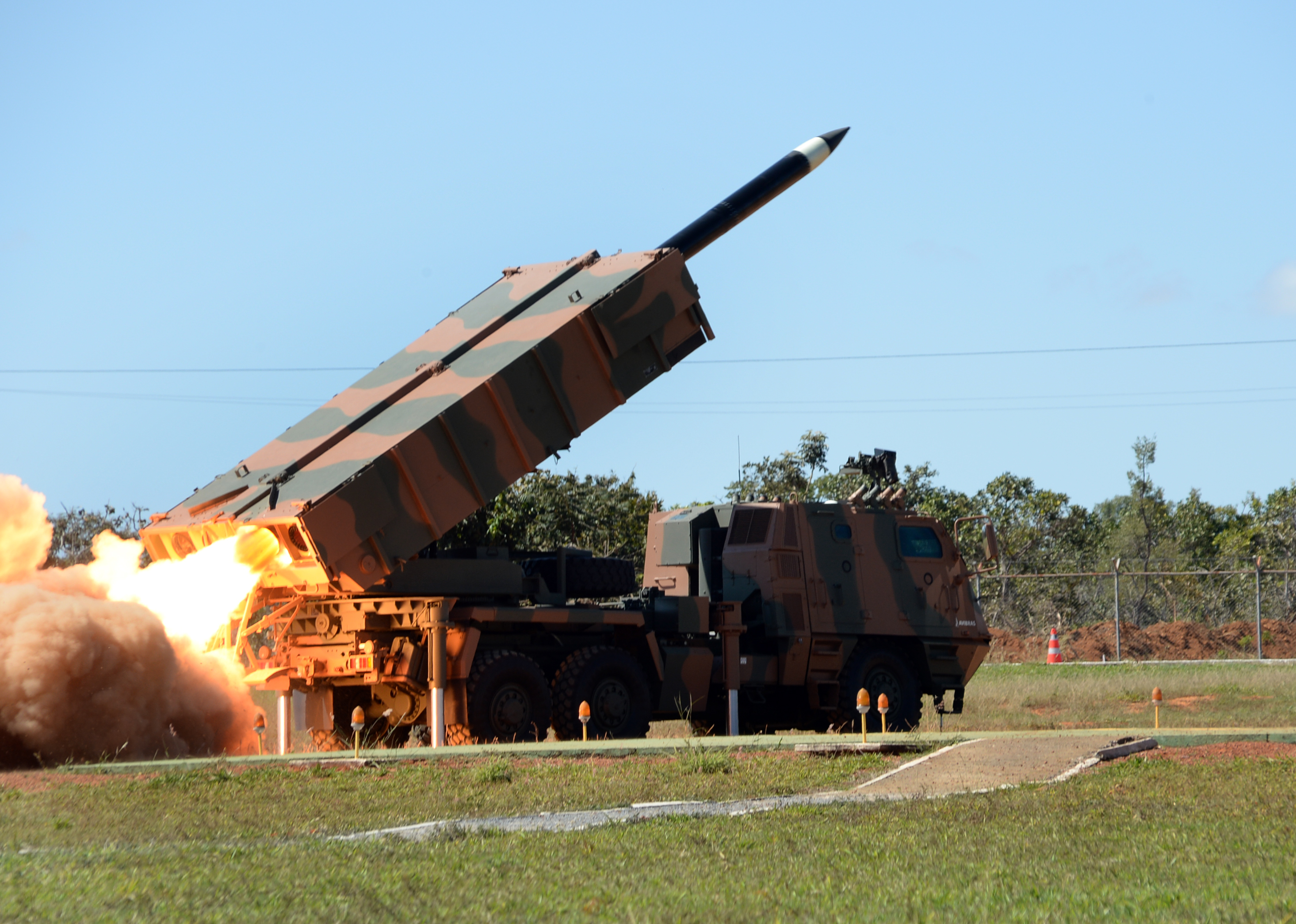 06/06/2014, Formosa - GO Fotos: Jorge Cardoso